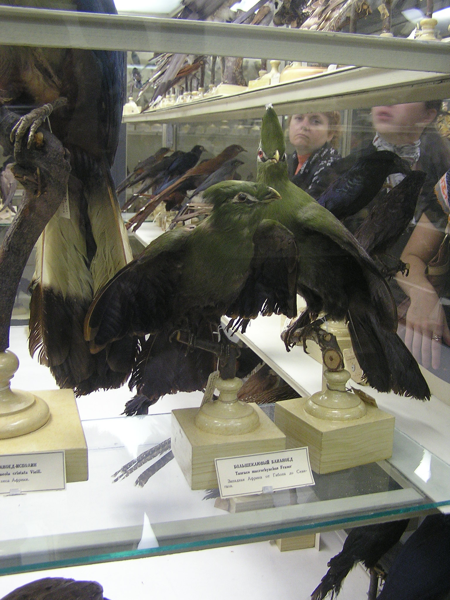 Зоологический музей в Санкт-Петербурге. Большеклювый бананоед